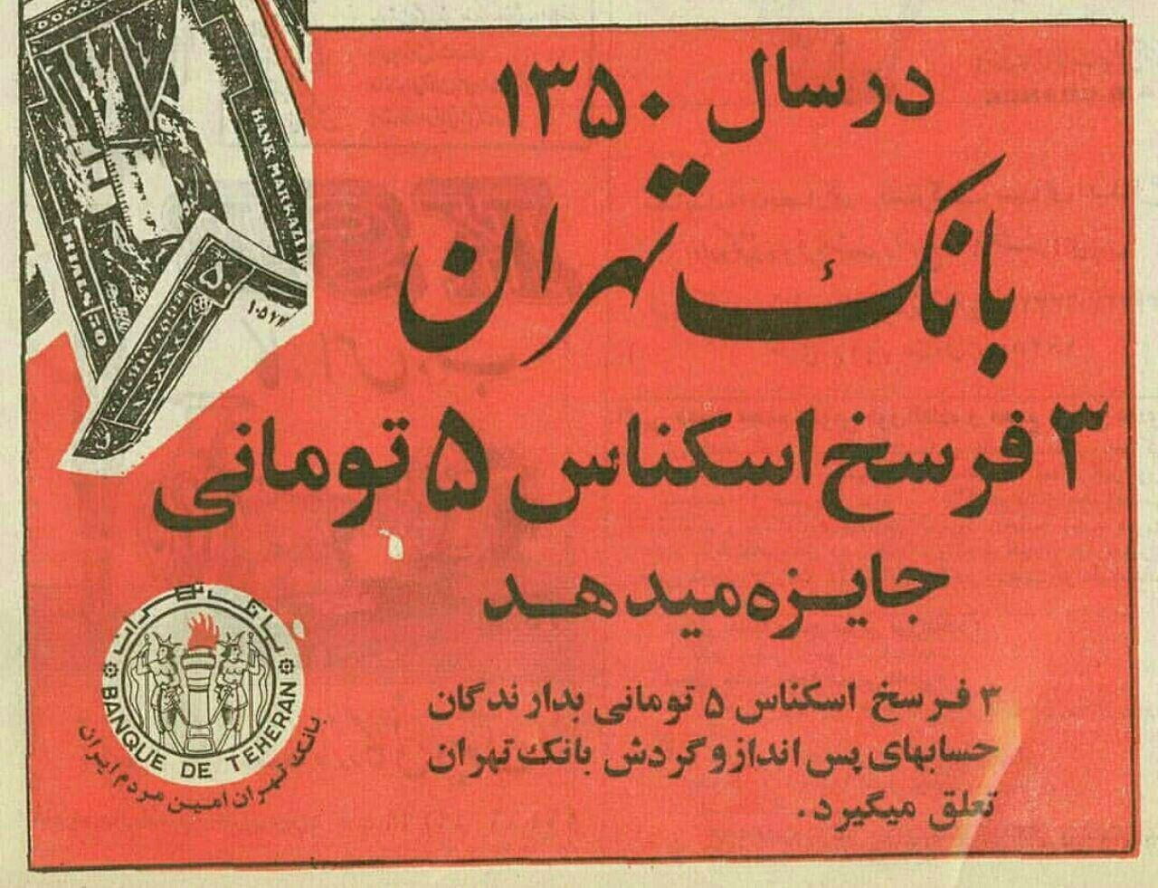 tehran-bank